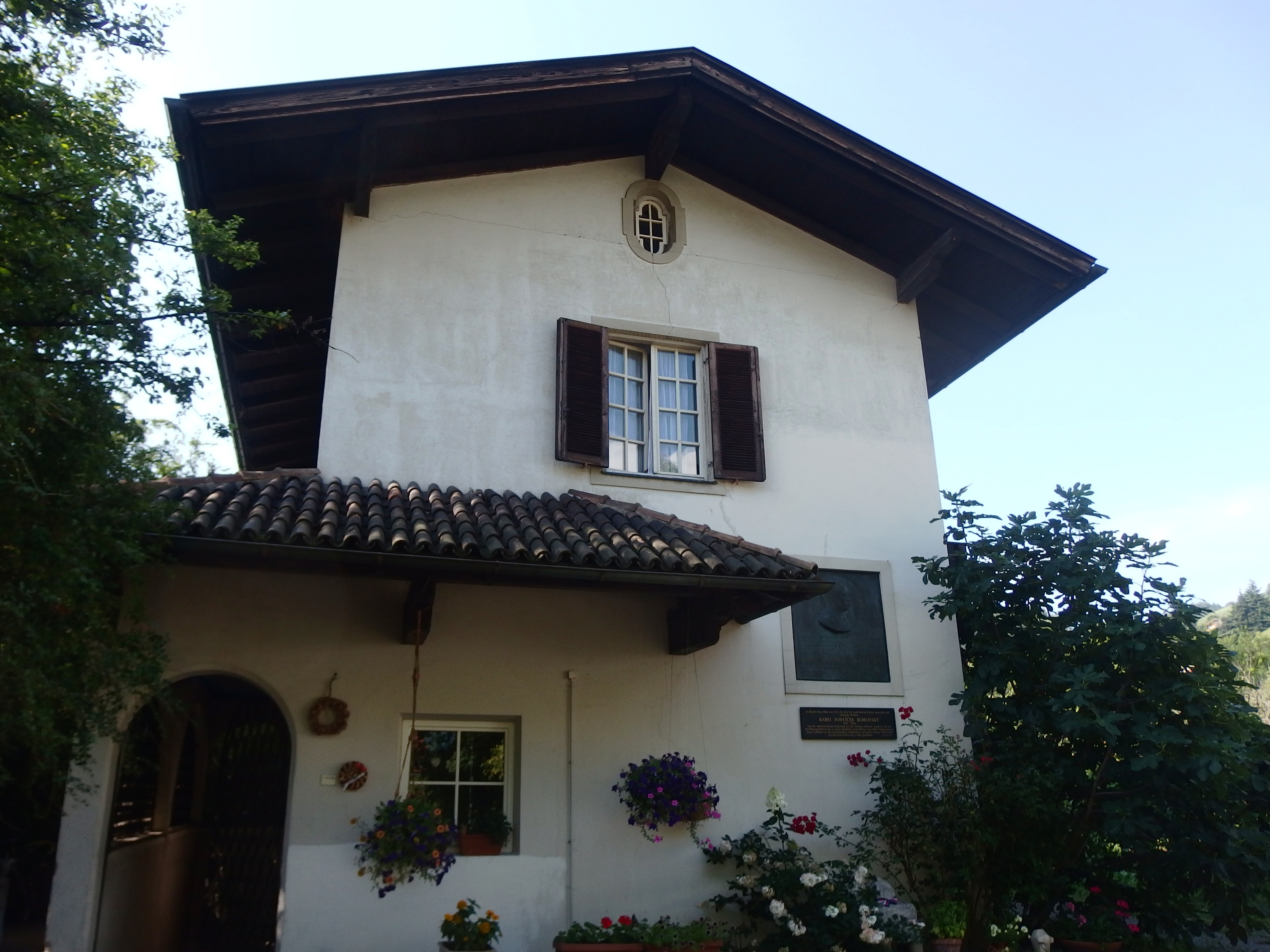 Brixen, Jižní Tyrolsko, Itálie. Dům Karla Havlíčka Borovského.